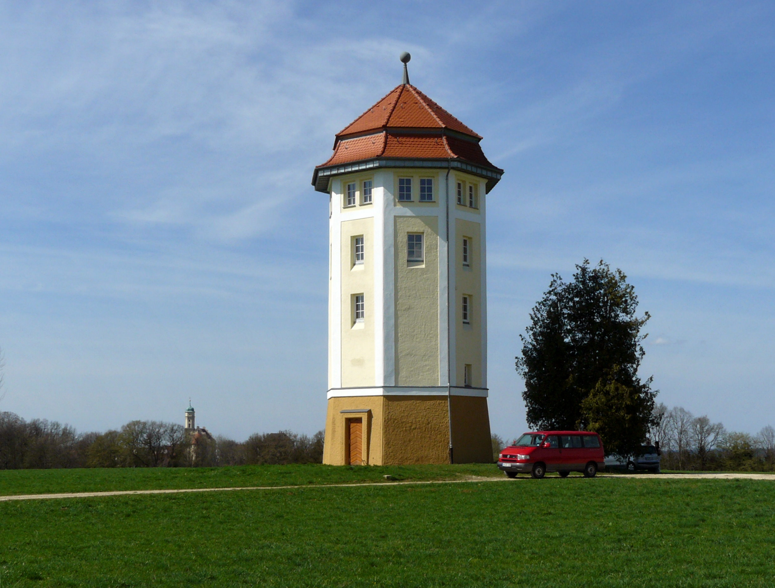 Alter Wasserturm bei Hohenstadt, Gemeinde Abtsgmünd, links im Hintergrund die Hohenstadter Schlosskirche